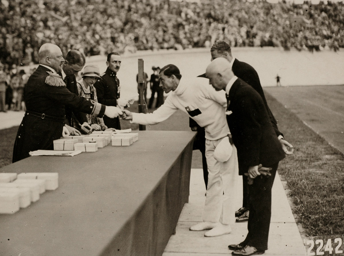 Olympische Spelen 1928 Amsterdam, Nederland: Prijsuitreiking zilver. Uitreiking van de zilveren medaille door Prins Hendrik aan Miguel Plaza Reyes uit Chili.